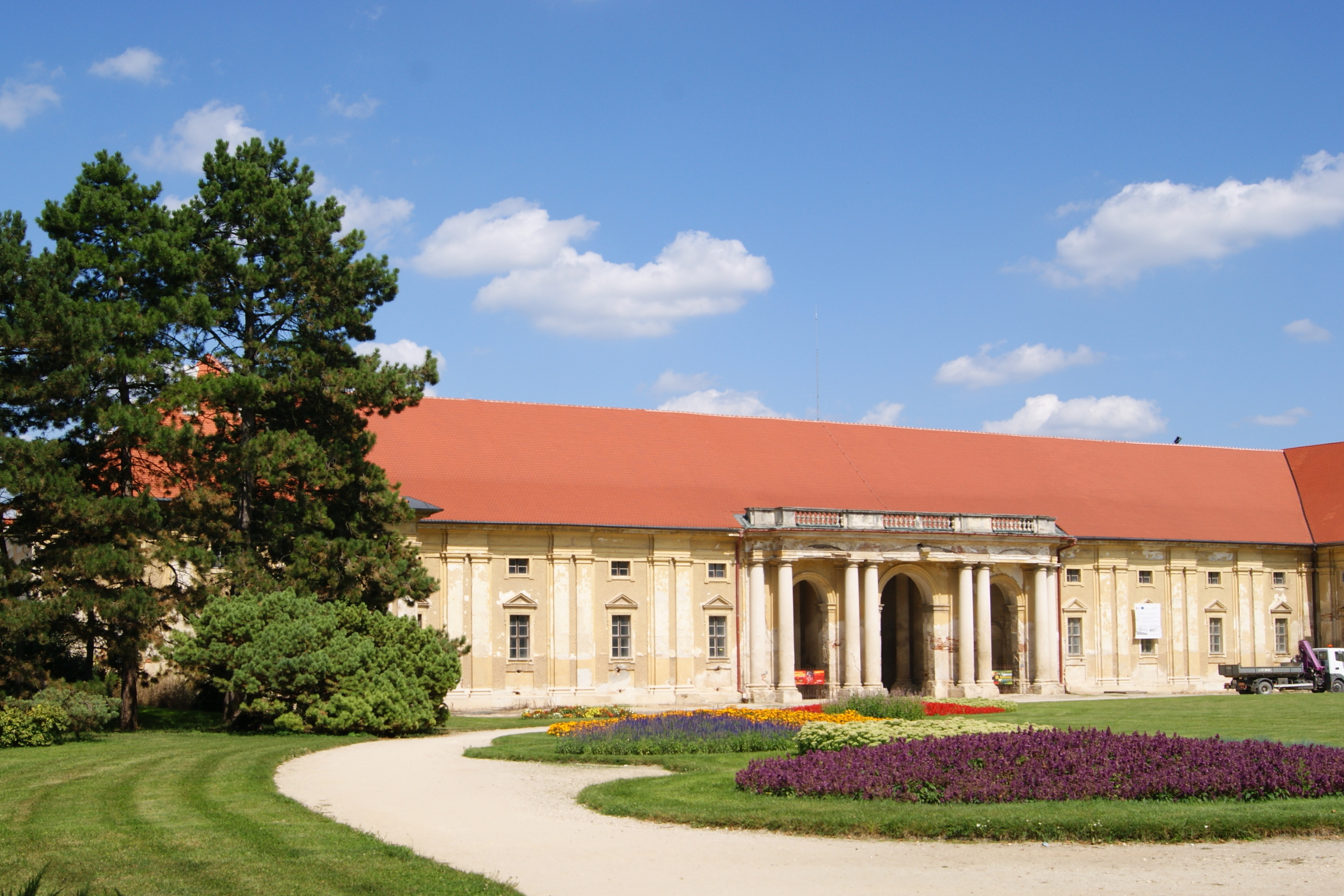 Zámek Lednice, Zámek 1, 2, Zámecké náměstí 67, Park 433, Lednice (okres Břeclav).